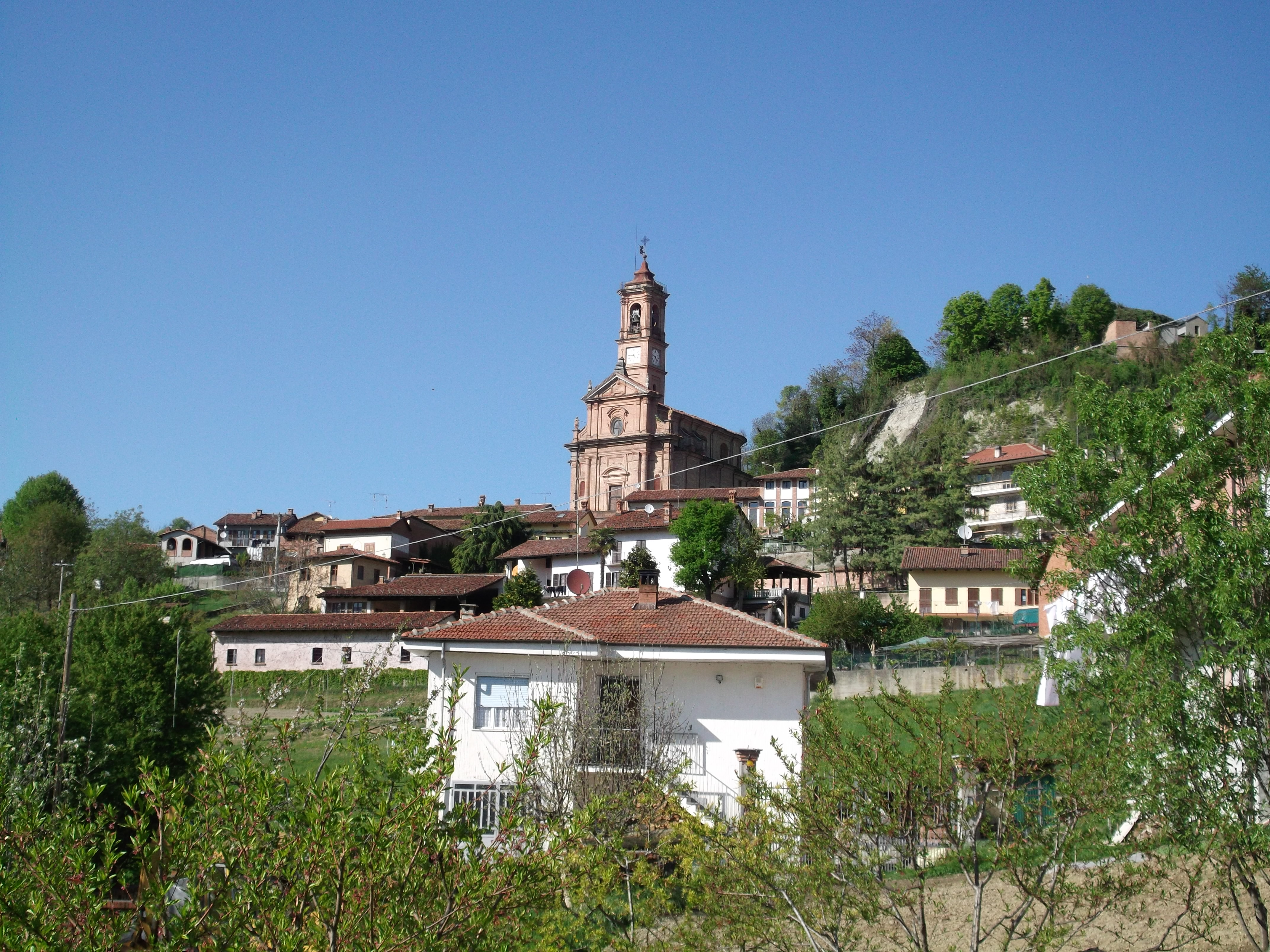 Comune di Aramengo, Asti (Italia)